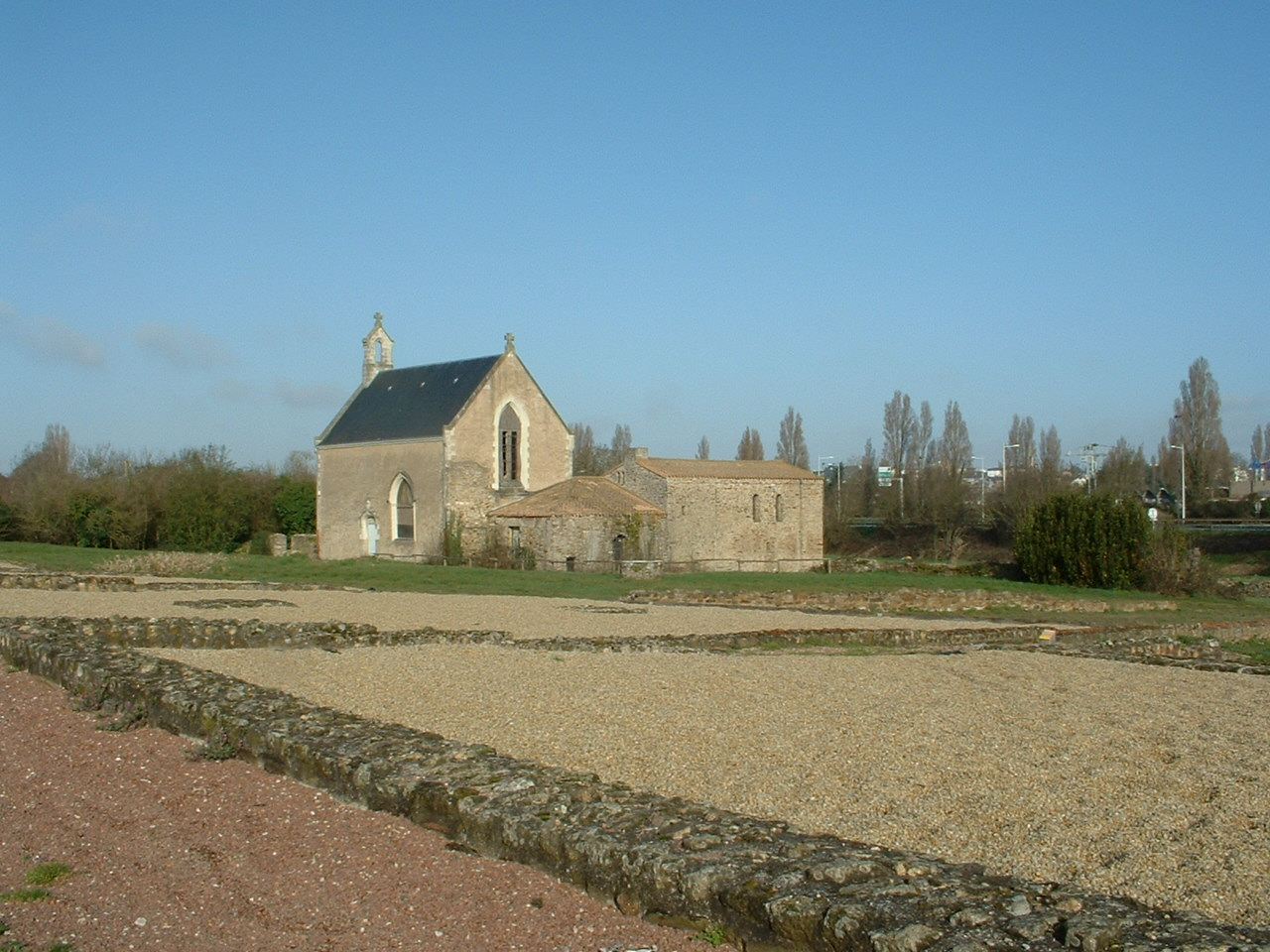 Site archéologique de Ratiatum